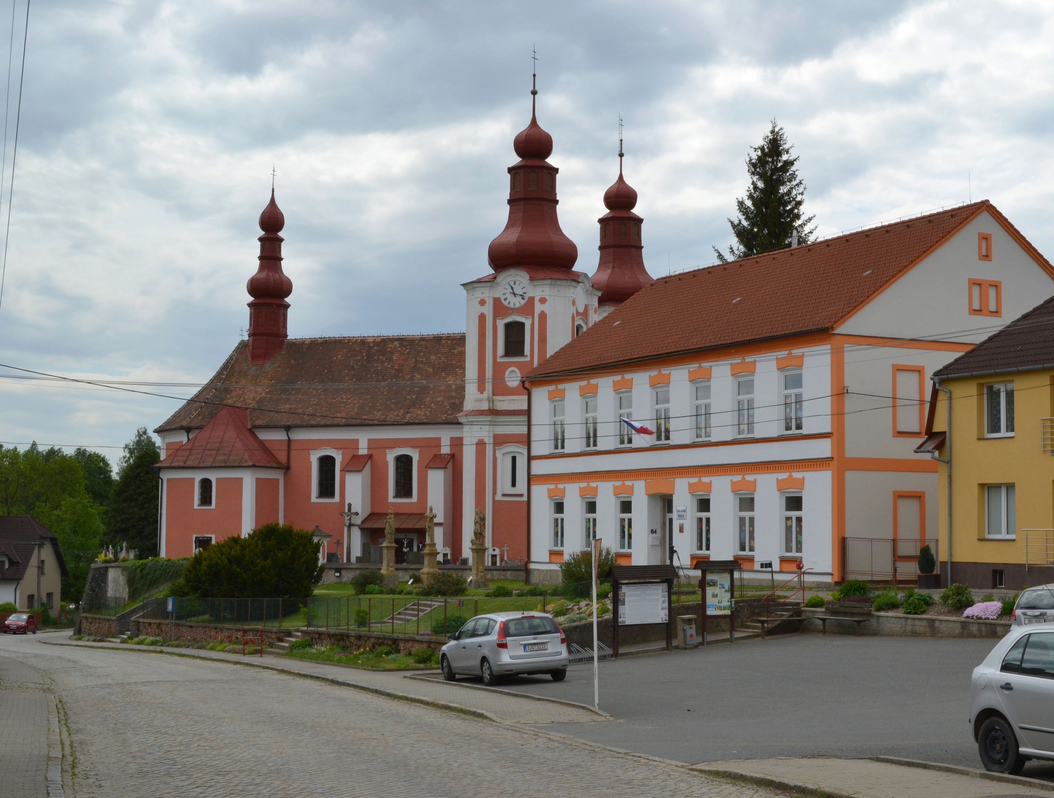 Rozsochy - kostel a škola